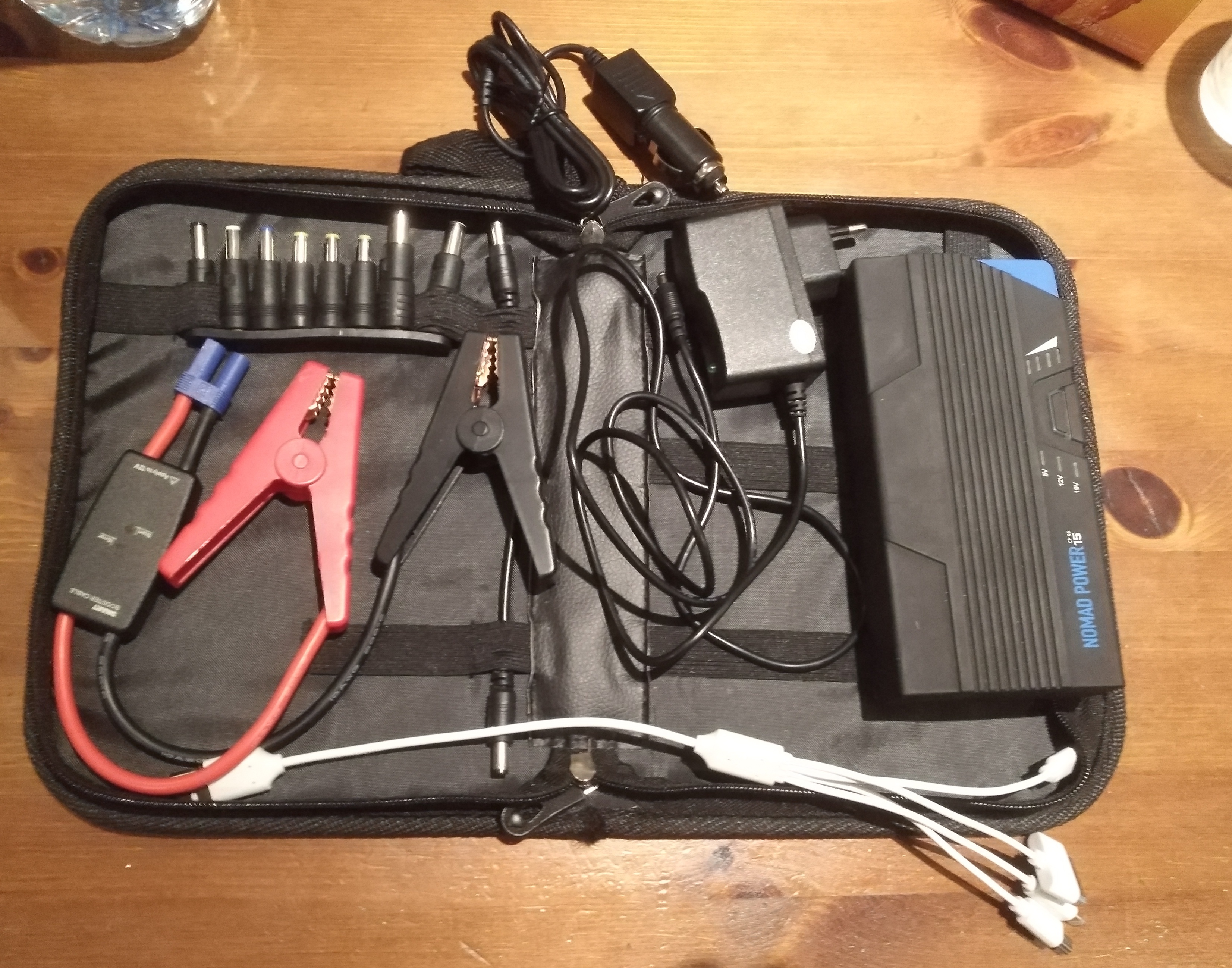 Batterie Nomad Power 15 et ses accessoires, utilisée pour la 2e WikiExpédition dans le Jura par la Cabale lyonnaise.